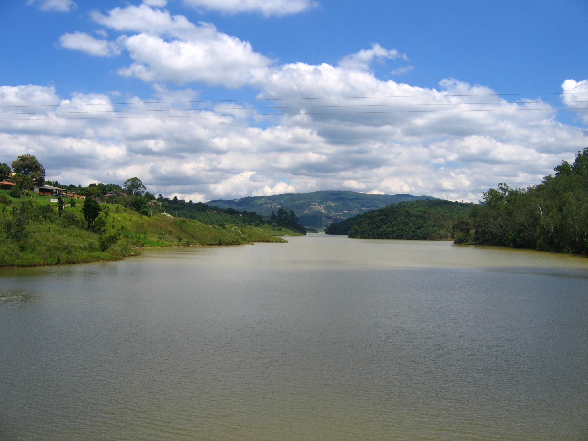 Represa Paulo de Paiva Castro